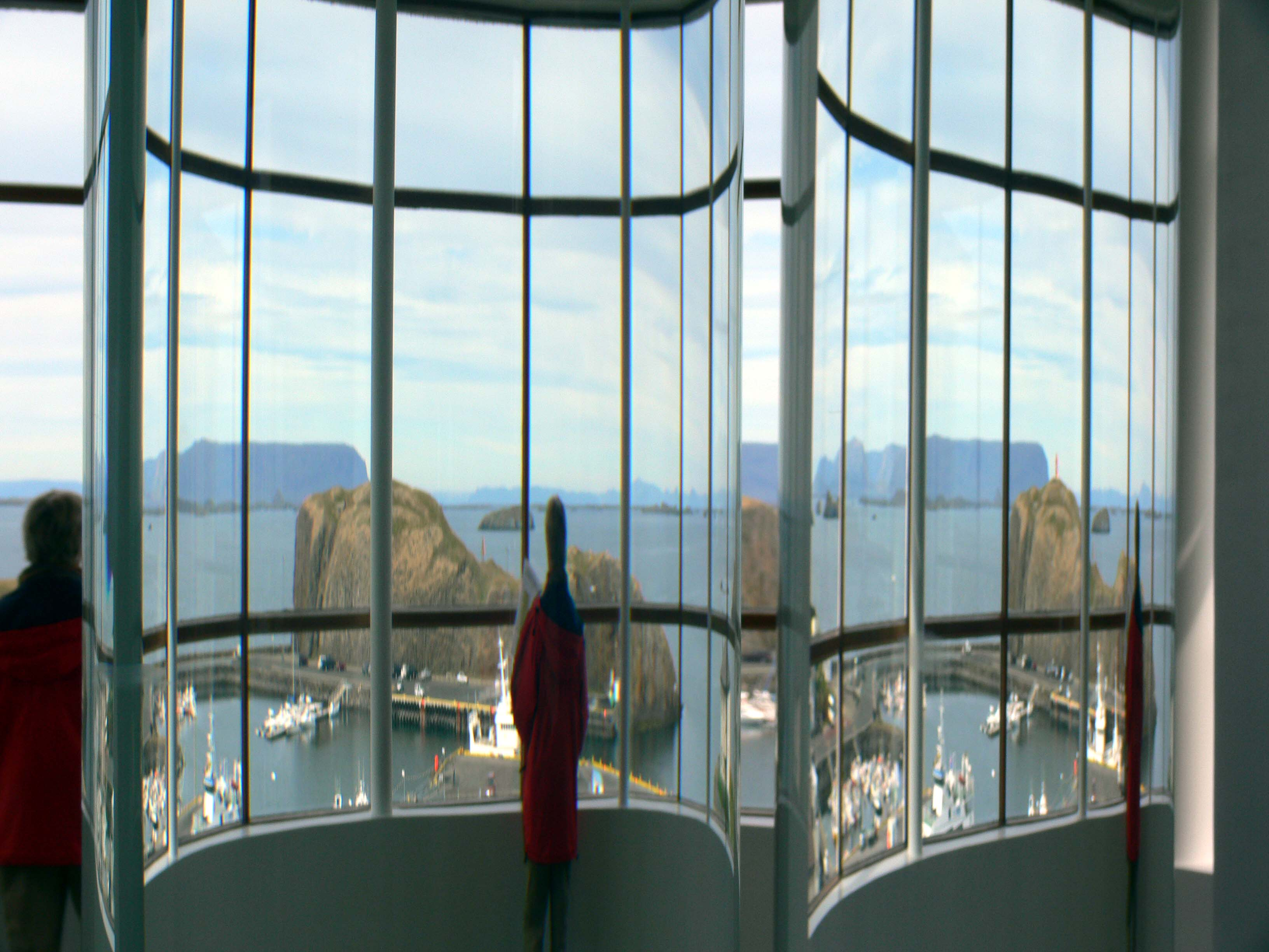 Stykkishólmur,Wassermuseum. Dort wird in Glassäulen Wasser aus allen Gletschern Islands gezeigt.